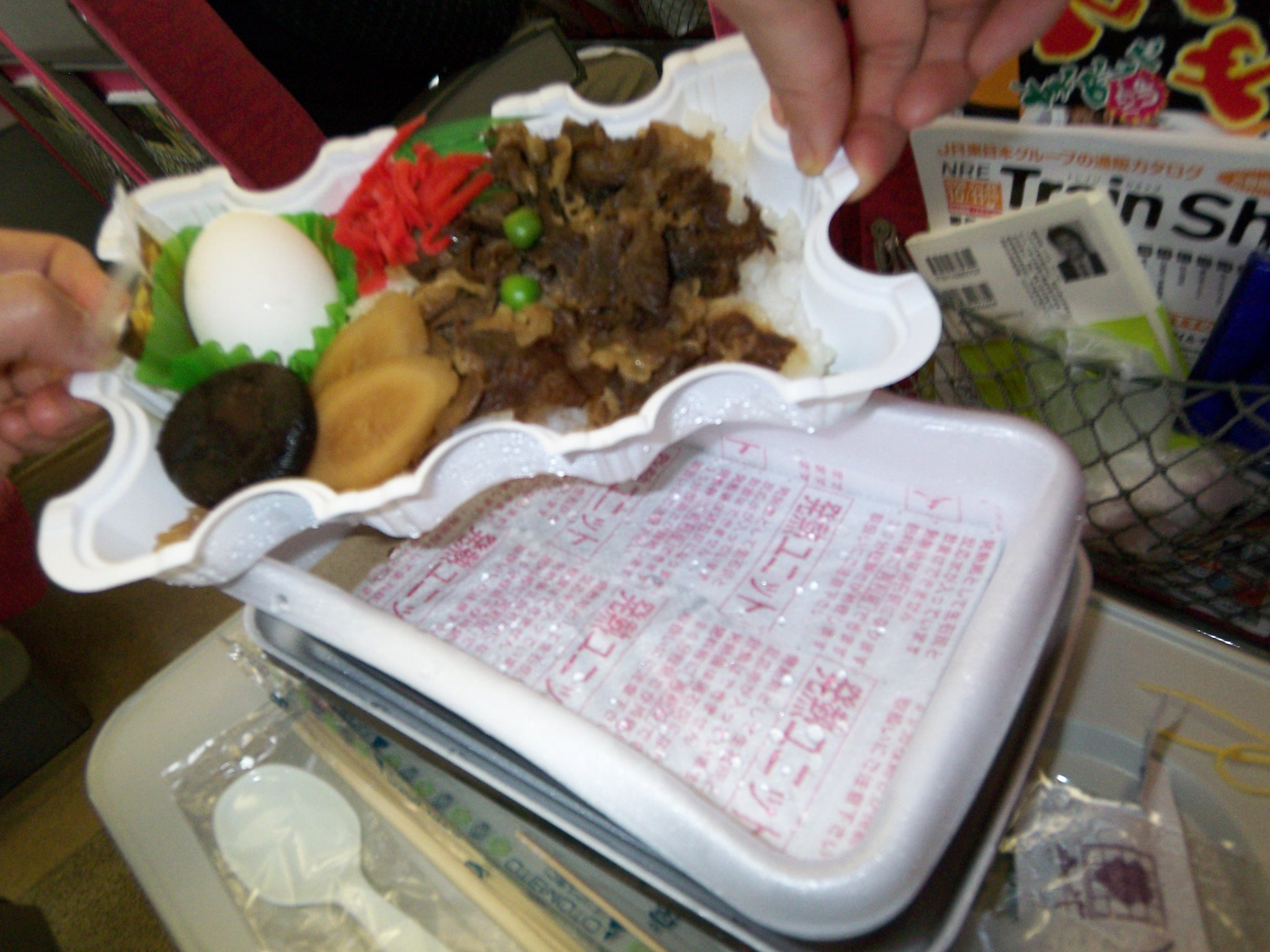 米沢の牛肉弁当があたたまる 東京にいきます。 山形からは、山形新幹線で3時間弱。 米沢駅に近くなると 車内アナウンスでながれる 『米沢名物 牛肉弁当が車内でお求めいただけます。。。』 今日は、いただくことにしよう。 2008年11月3日(月祝) 二種類あるので、それぞれ１個づつもとめた。 一つは、 牛肉どまん中。 こちらが、名物の牛肉弁当です。 まだ、あたたかい。 味も作り手の暖かさがつたわる。落ち着いた味である。 もう一つは、すき焼き弁当 こちらは、加熱式容器で、ほっかほかになるのです。 すき焼き弁当なので、温泉たまご もついてきます。 ほっかほかになる所がおもろーなので、 youtubeに収録してみました。 まさに、理科の教材です。 その説明が簡単にまとめてあったので、記録しておきます。 ■ 関連記事 ■ 関連キーワード 牛肉弁当 すき焼き弁当 新幹線の弁当